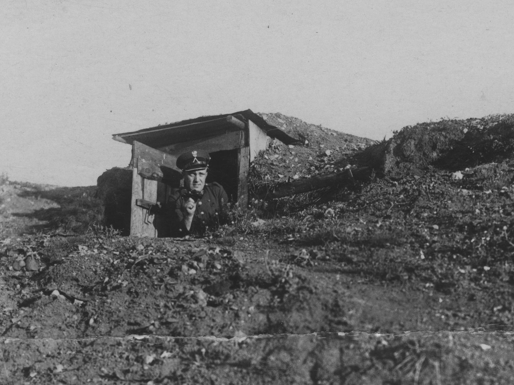 Komisariat Straży Granicznej Piekary - Szarlej - patrol w terenie.